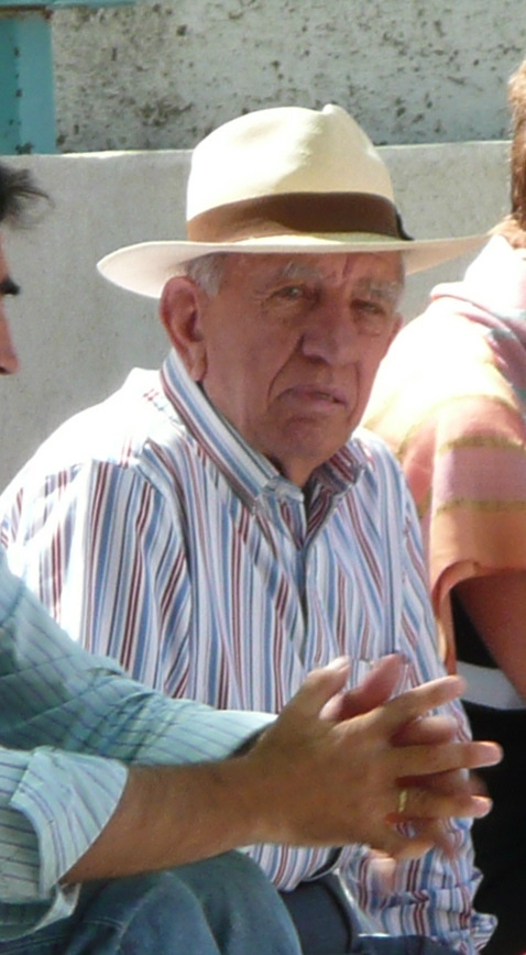 Victorino Martin lors d'une novillada dans le cadre de la Feria du Toro 2009 à Beaucaire